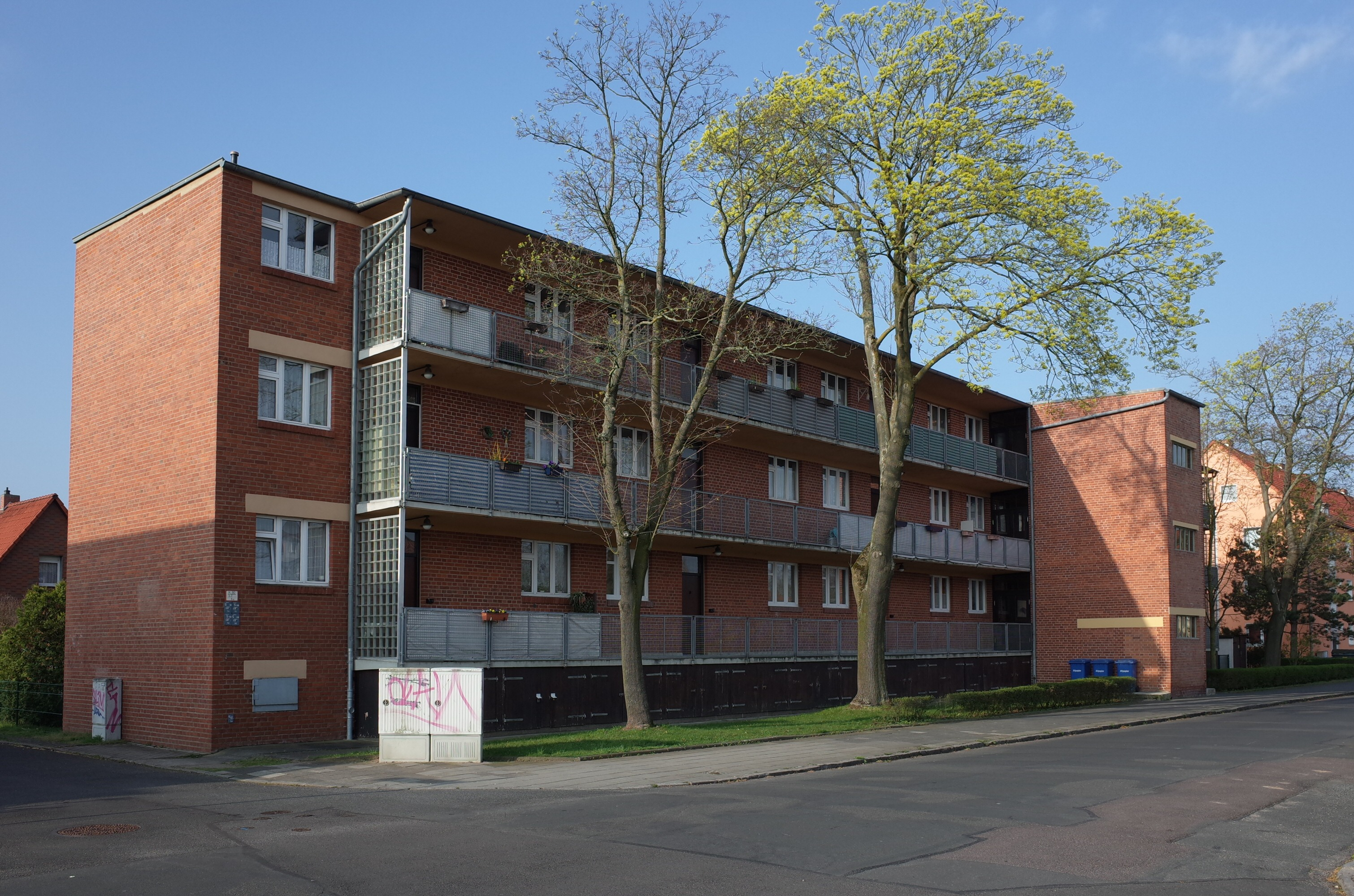 Bauhaus Dessau, Laubenganghaus Mittelbreite 6.